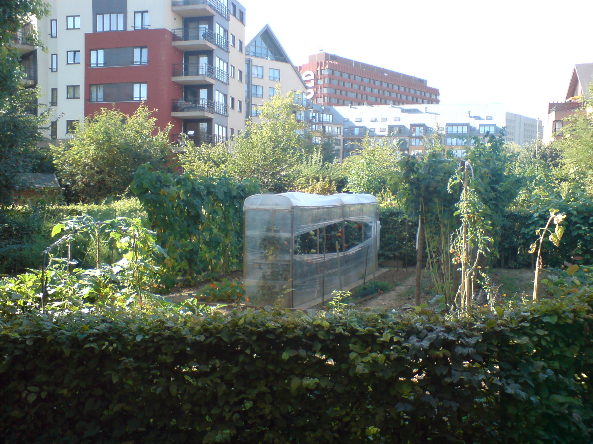 Jardins écologiques dans le quartier Olympiade (Péloponèse-Frioul) à Evere